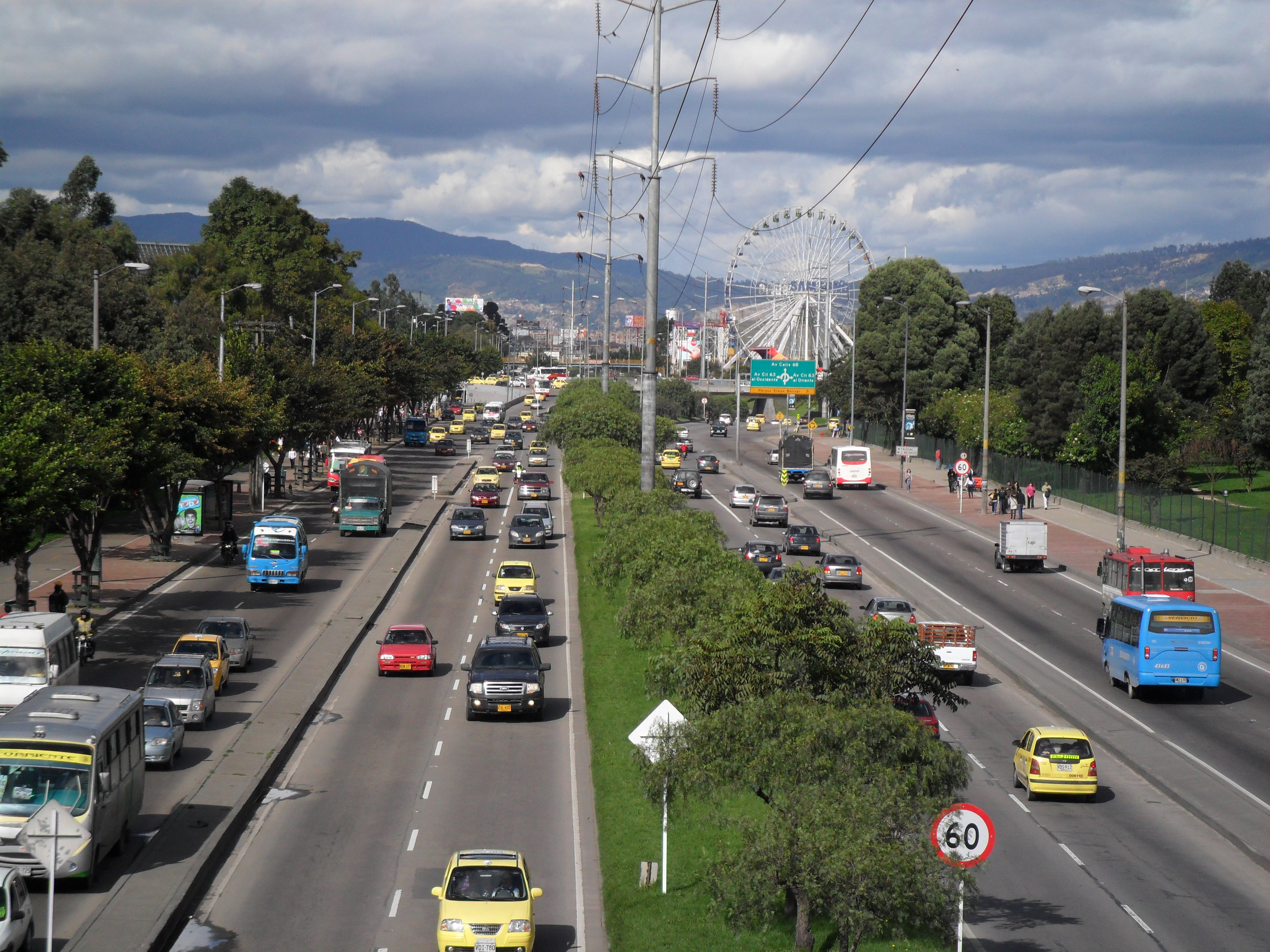 Avenida 68 en Bogotá.